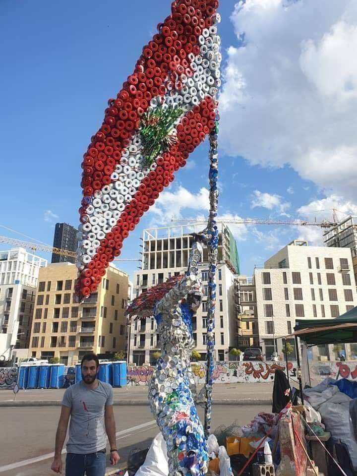 Installation im Rahmen der Proteste auf dem Beiruter Märtyrerplatz